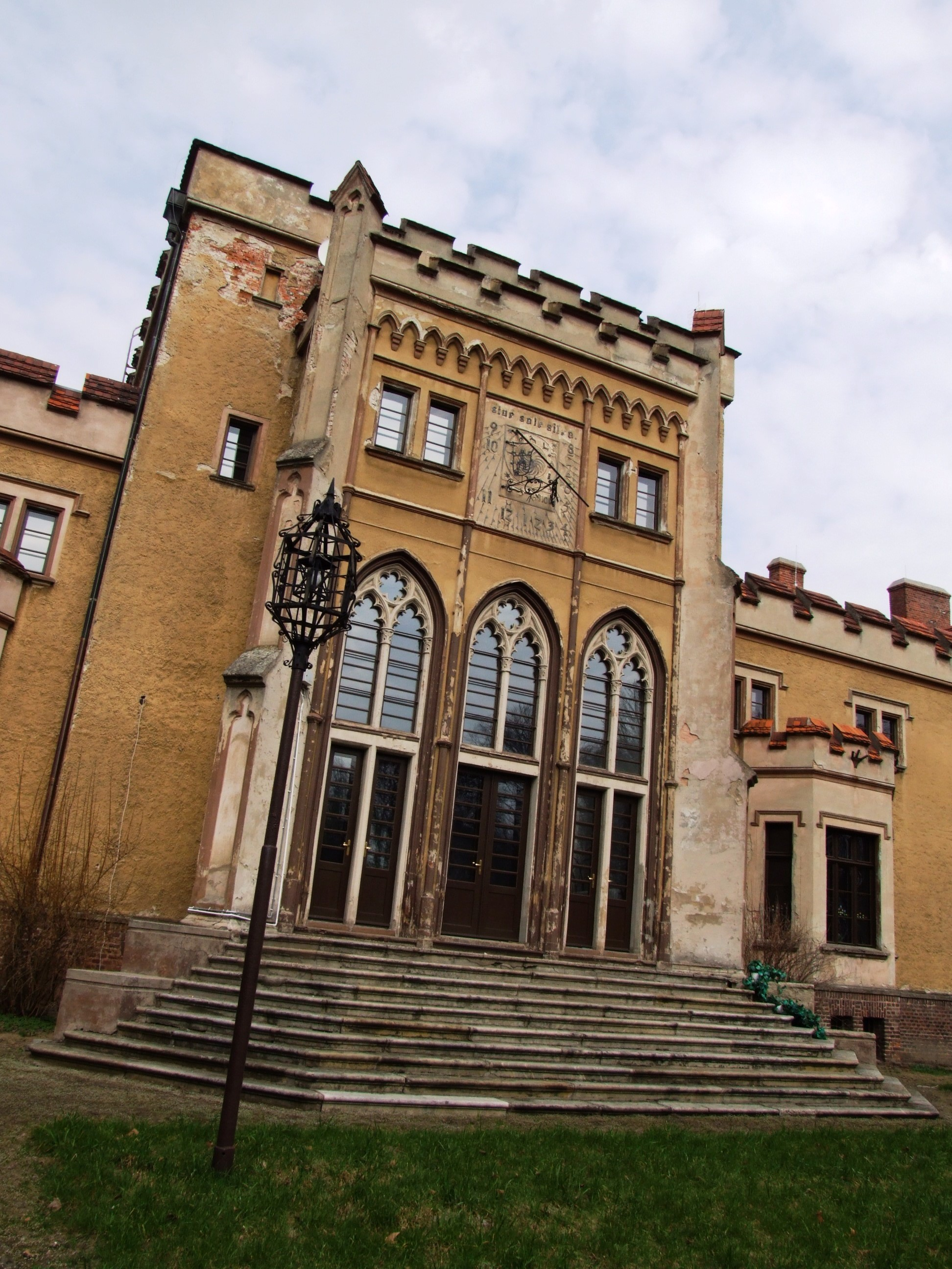 Tylna część pałacu Radolińskich w Jarocinie, rok 2013.